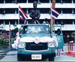 อัญเชิญพระบรมรูปพระบามสมเด็จพระจุลจมเกล้าเจ้าอยู่หัวมาประดิษฐาน ณ โรงเรียนสวนกุหลาบวิทยาลัย รังสิต